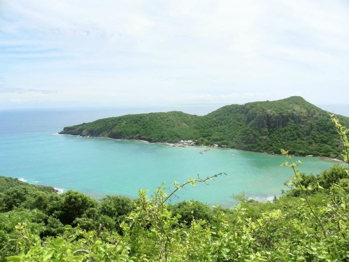 Morne Morel et baie du Marigot vus du Fort Napoléon sur le Morne Mire sur l'île de Terre-de-Haut (îles des Saintes) Antilles Françaises .